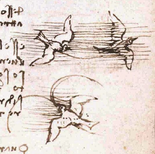 Codice sul volo degli uccelli